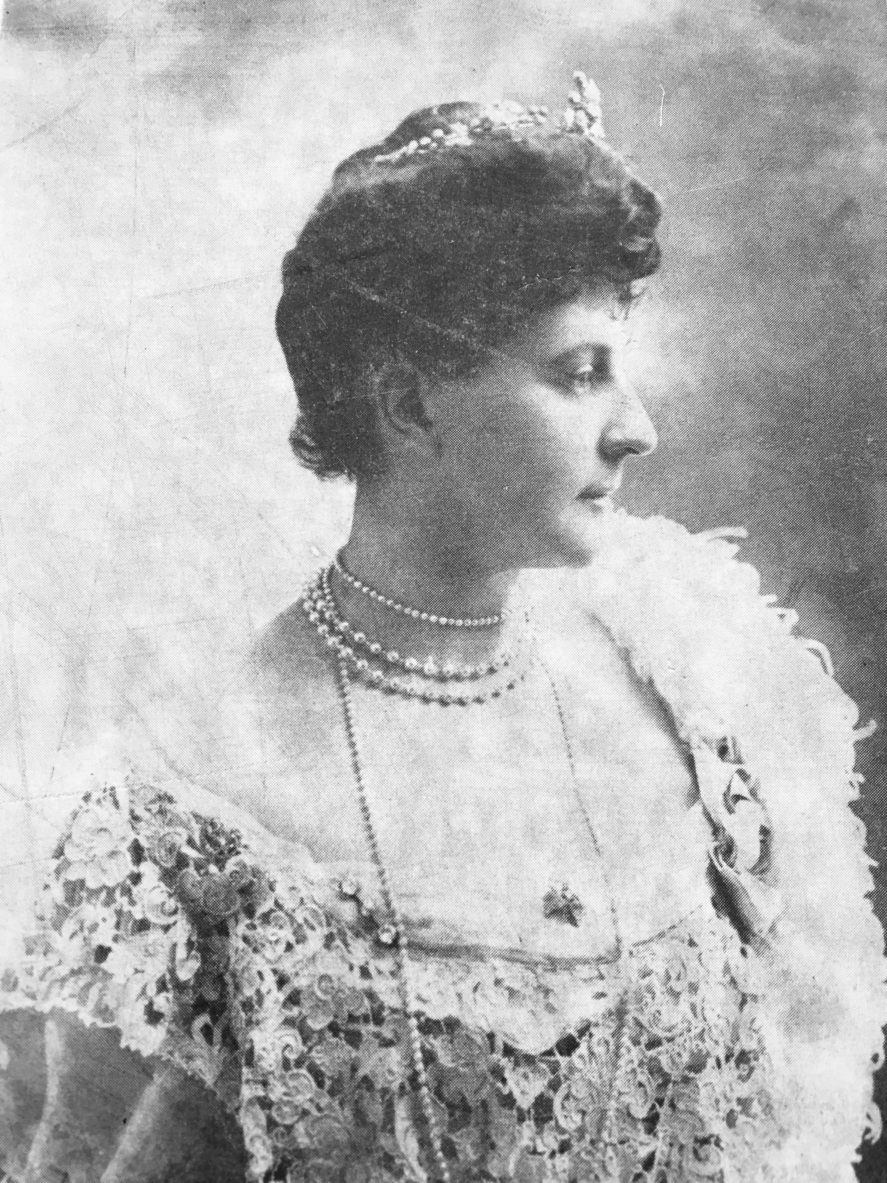 Från biografin Förgången glans